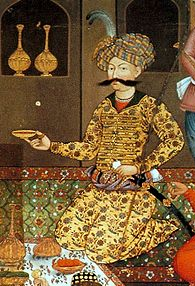 Chihil_Sutun_Шах_Аббас_I